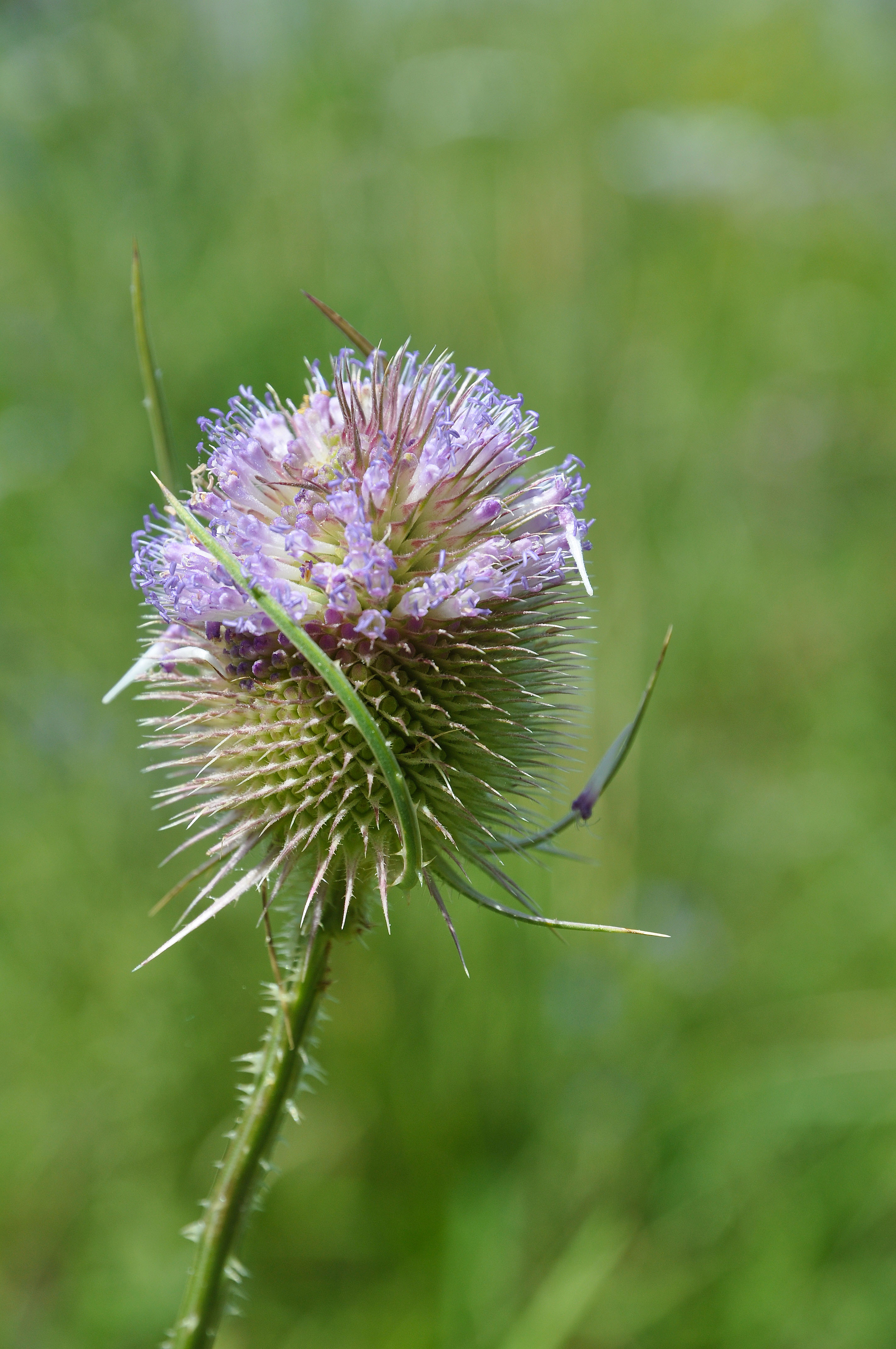 Cardère sauvage du Territoire de Belfort